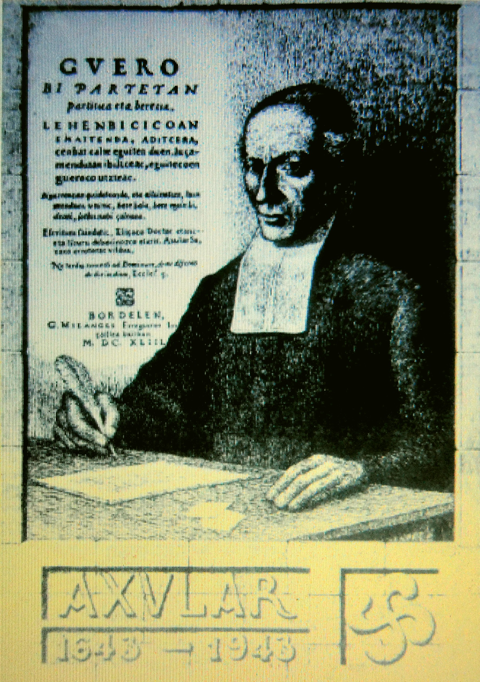 Jose Eizagirre Aiestaran marrazkilariaren arabera marraztutako Pedro Agerre "Axular" euskal idazlearen irudia. - Imaginary portrait of basque writer Pedro Agerre "Axular", drawing by Jose Eizagirre Aiestaran.